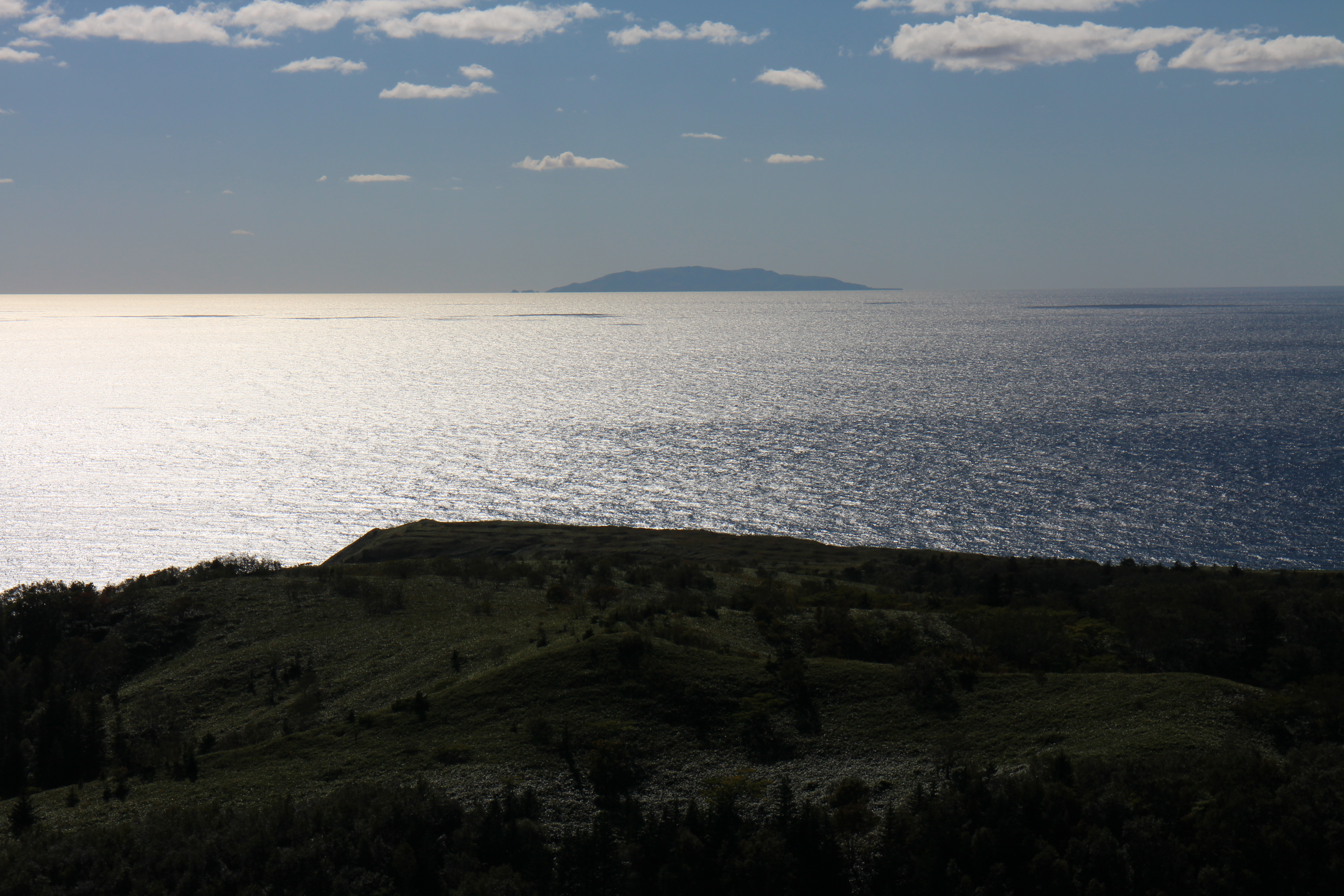 Остров Монерон, Невельский муниципальный район This image is related to the protected area of Russia number 6510059